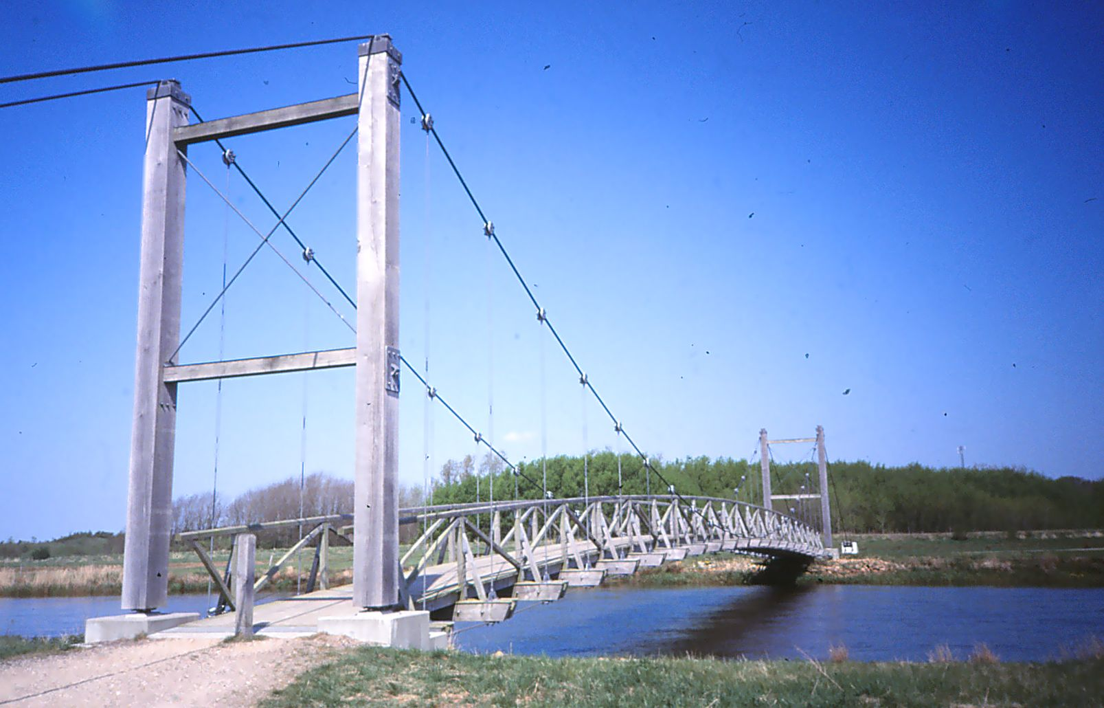 Skjern Å med hængebro, etableret ved restaurering af åen. Foto fra maj 2006.